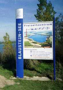 Schild am Blausteinsee bei Dürwiß